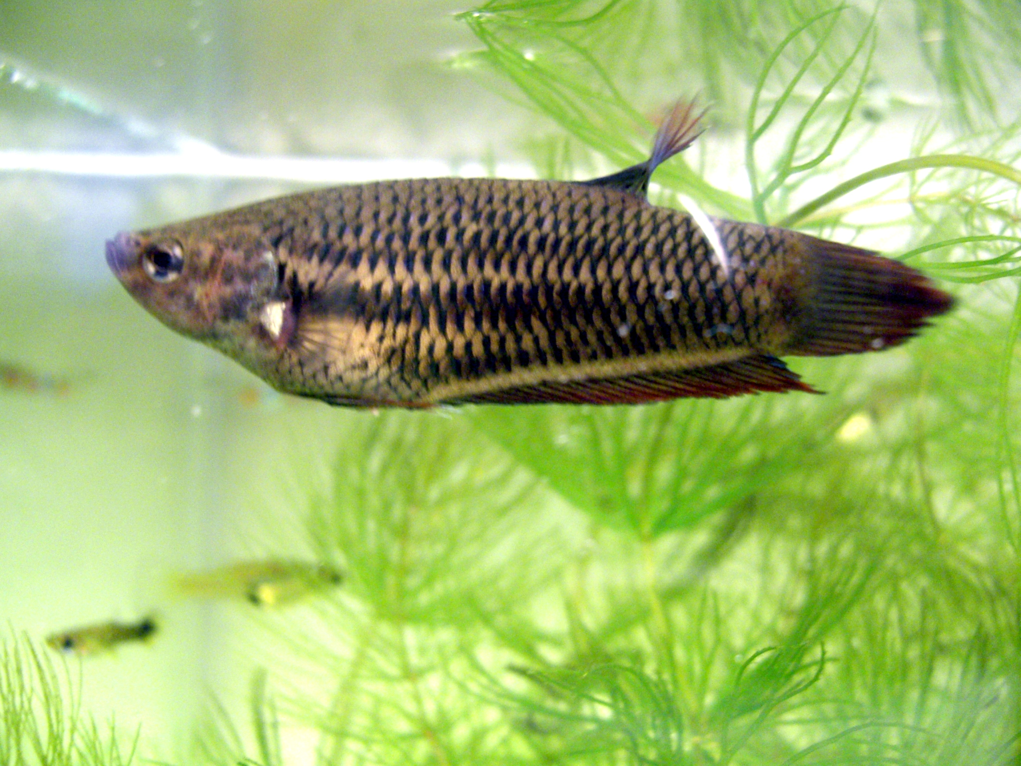 Ein Kampffisch in meinem Aquarium